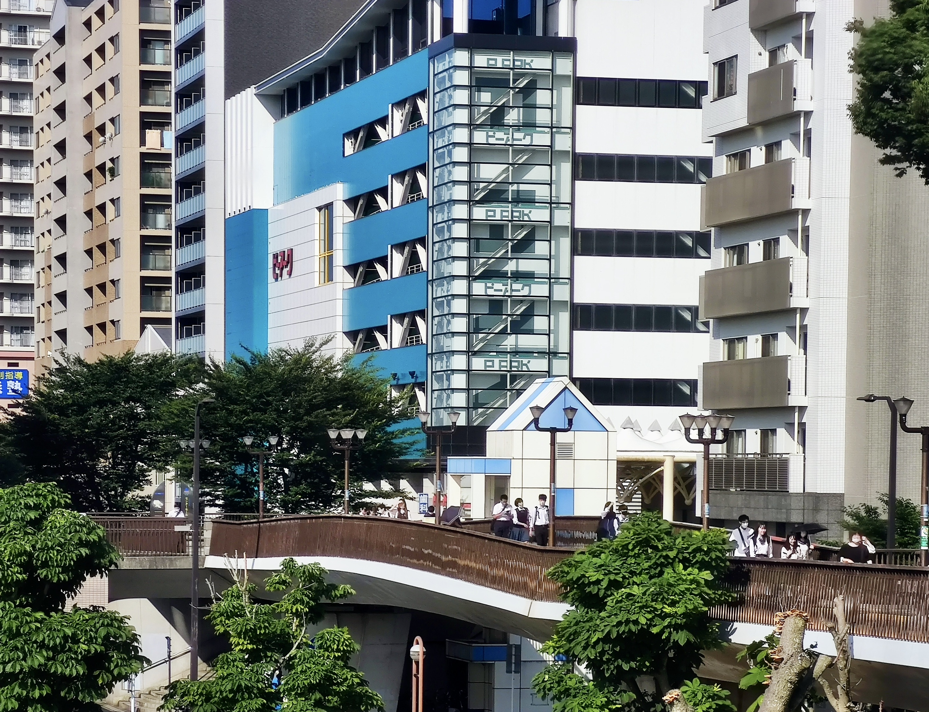 鎌取駅南口ペデストリアンデッキ